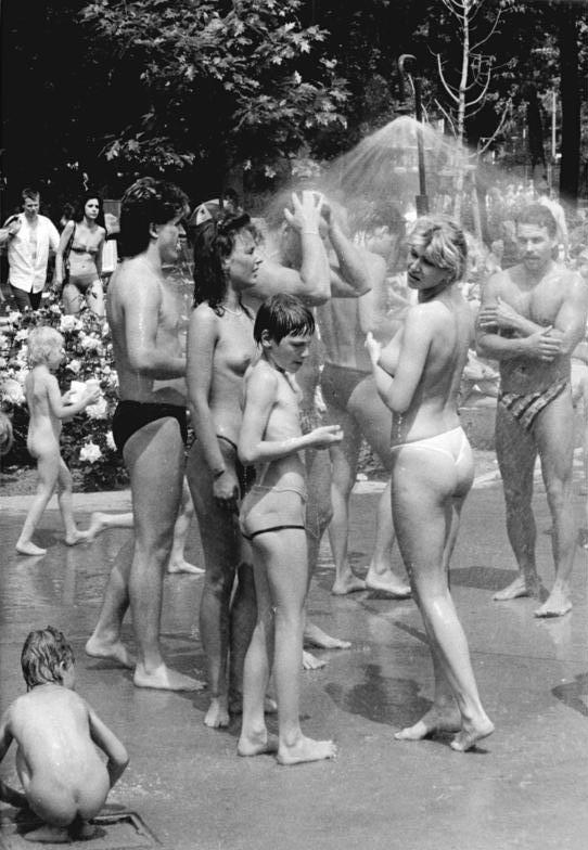 ADN-ZB Oberst 2.7.87 Berlin: Wetter- Nach einem Sonnenbad bringt die Dusche im Freizeitpark des Sport- und Erholungszentrums erfrischende Kühle.